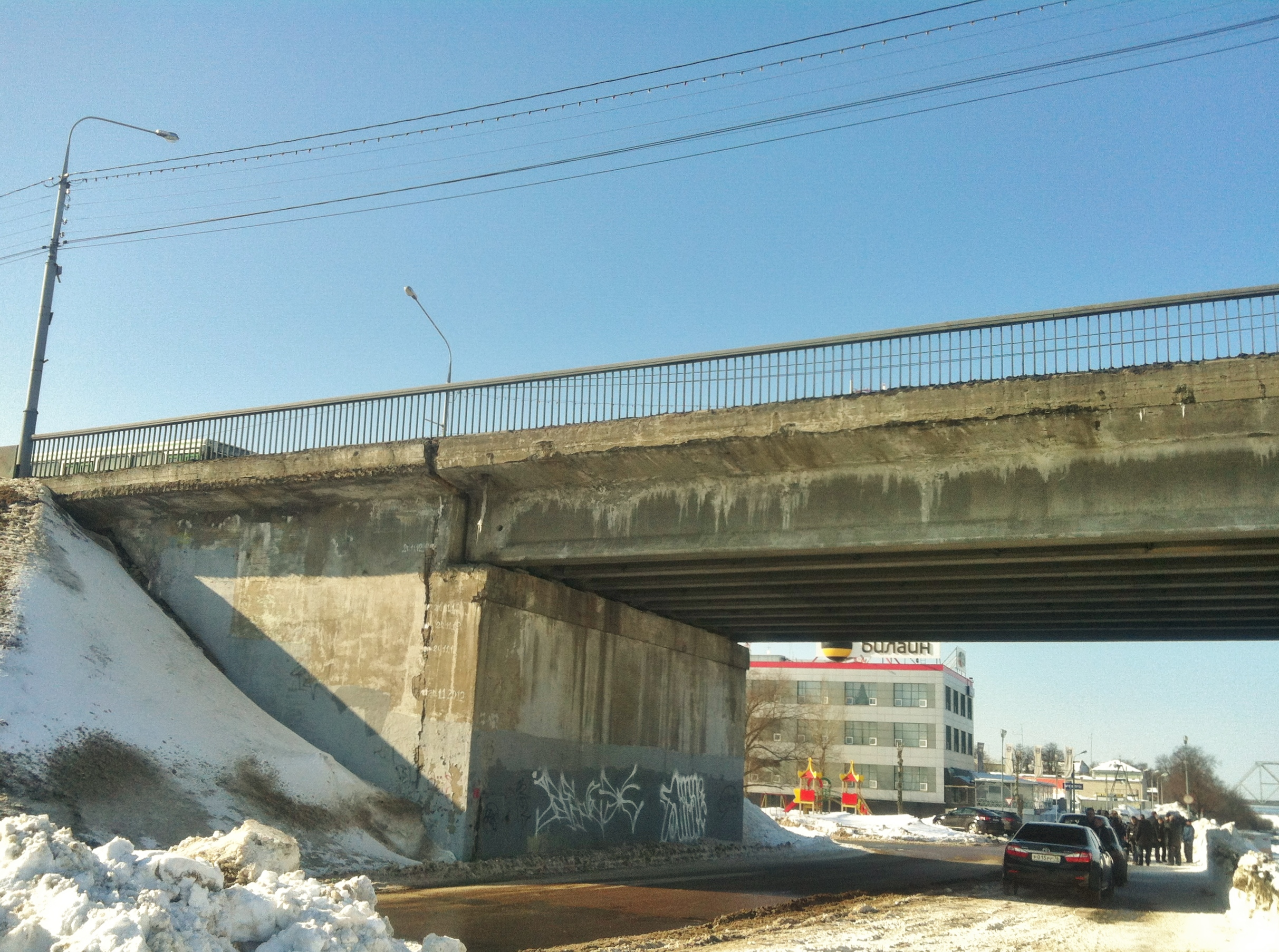 Октябрьский мост в Ярославле в 2013 г.